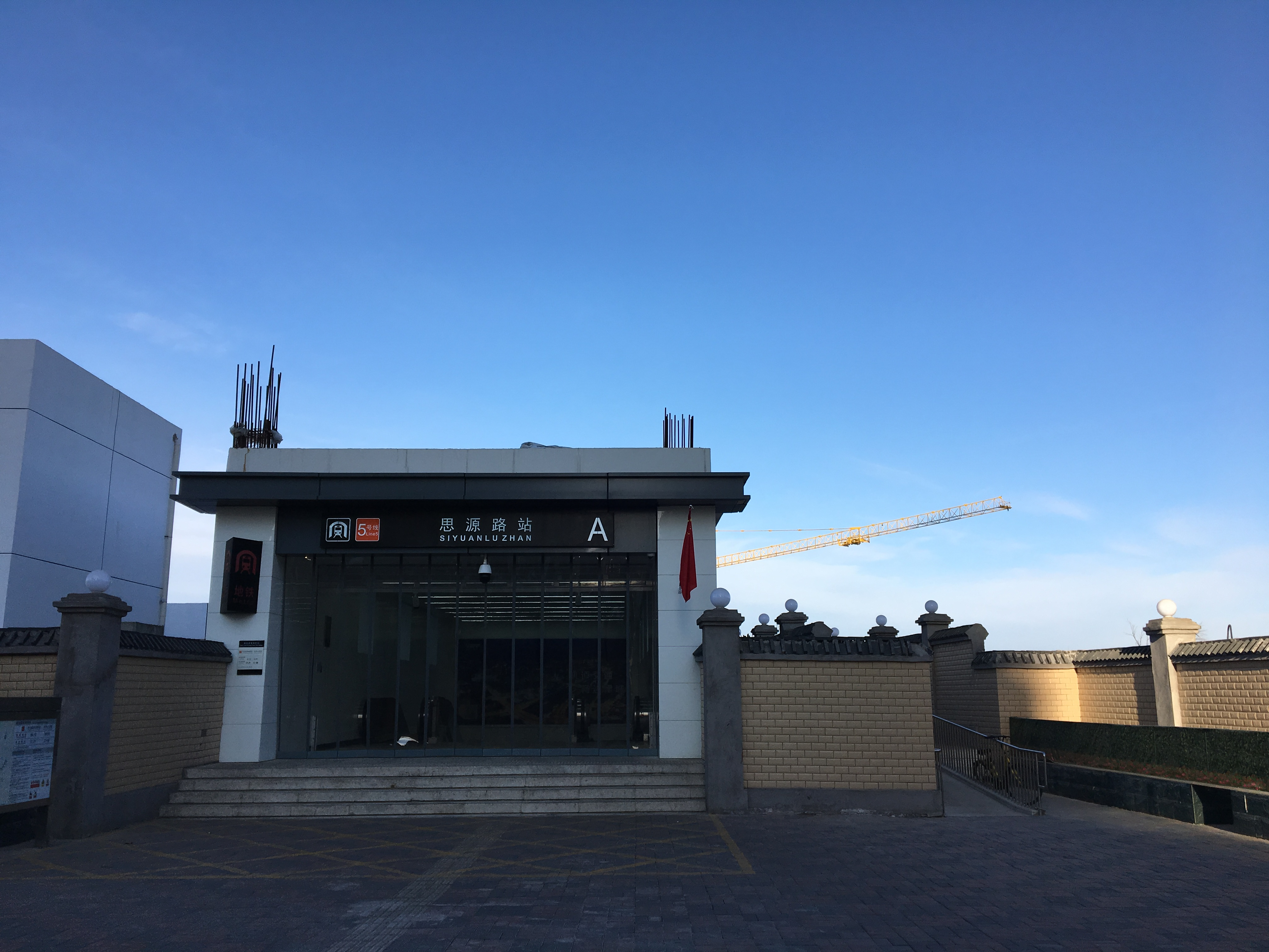 天津地铁思源路站A出入口